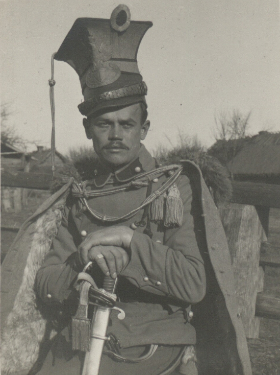 Ułan Beliny Putiatycki, Werchy [1916] 1 fot. : odb. na pap. srebrowo-żelatynowym ; 11,2x8,2 cm